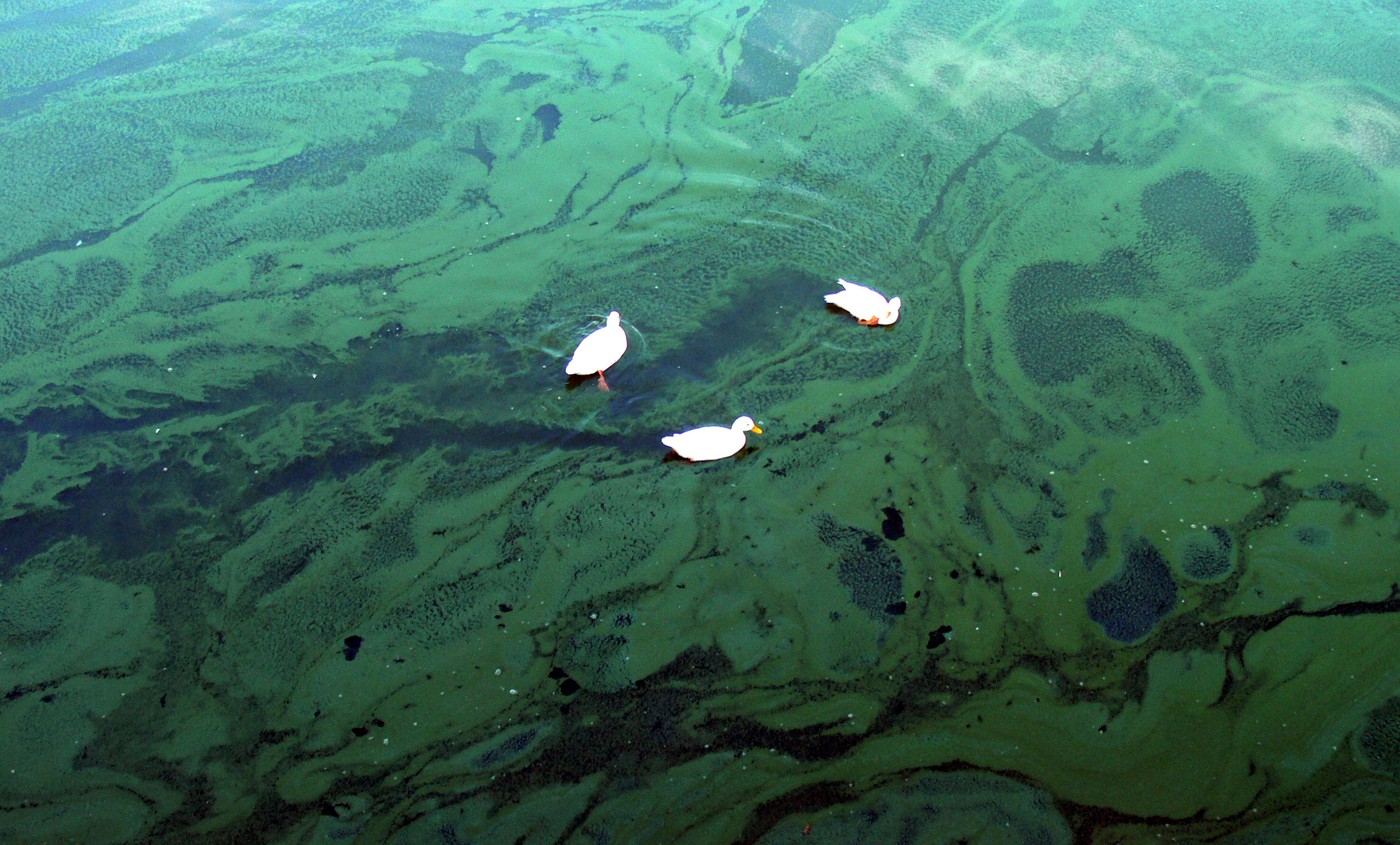 Canards nageant et "broutant" dans une zone d'accumulation en surface de plancton a priori constituée de cyanophycées (autrefois classées comme "algue bleue"), située dans l'ancien bras d'un canal aujourd'hui fermé. Lieu : Quai du Vault à Lille (France), non loin du centre ville, après une longue période pluvieuse (non caniculaire, et même sous les moyennes saisonnières, mais avec des nuits inhabituellement douces).